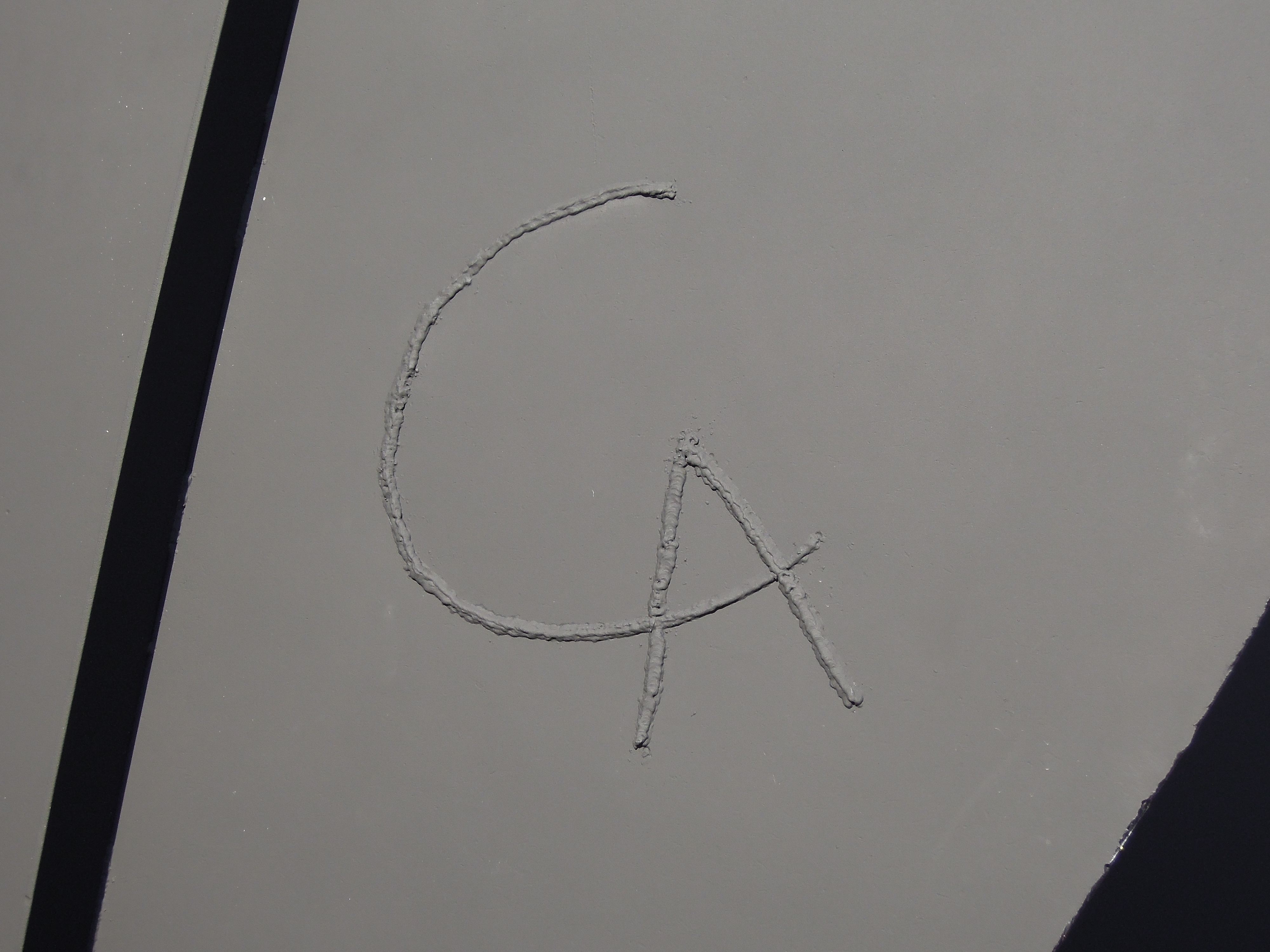 Sigla di Alexander Calder sul Teodelapio, opera del 1962, sita in piazza Polvani a Spoleto